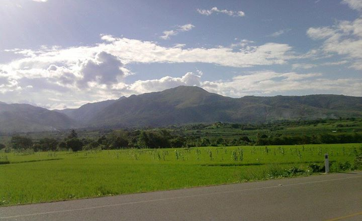 CerroShumba